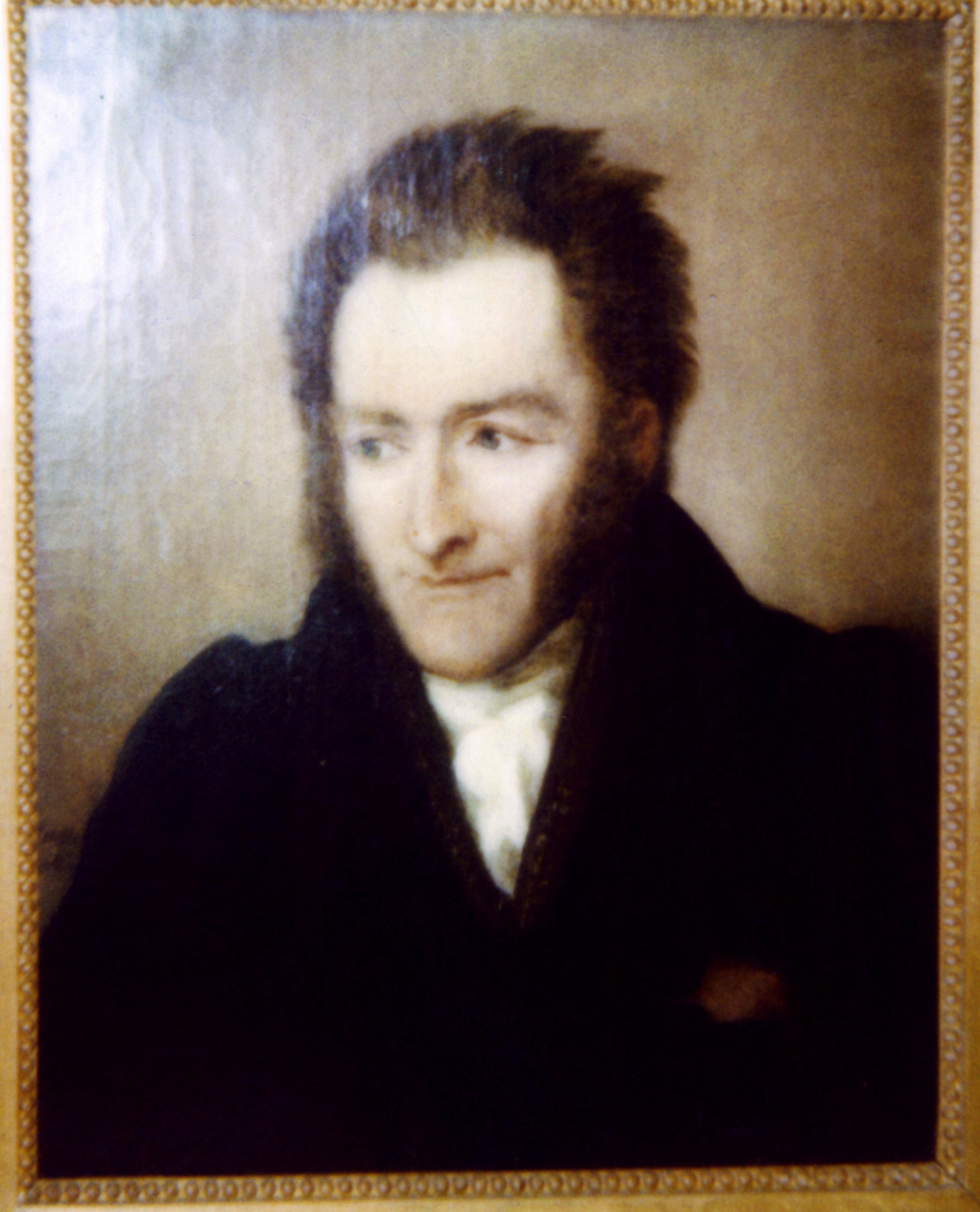 Porträt von August von Rechberg